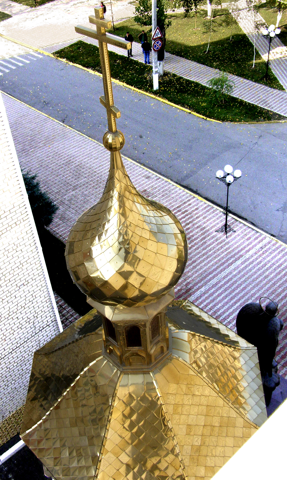 Каплиця на території ЛДУВС (Луганськ)